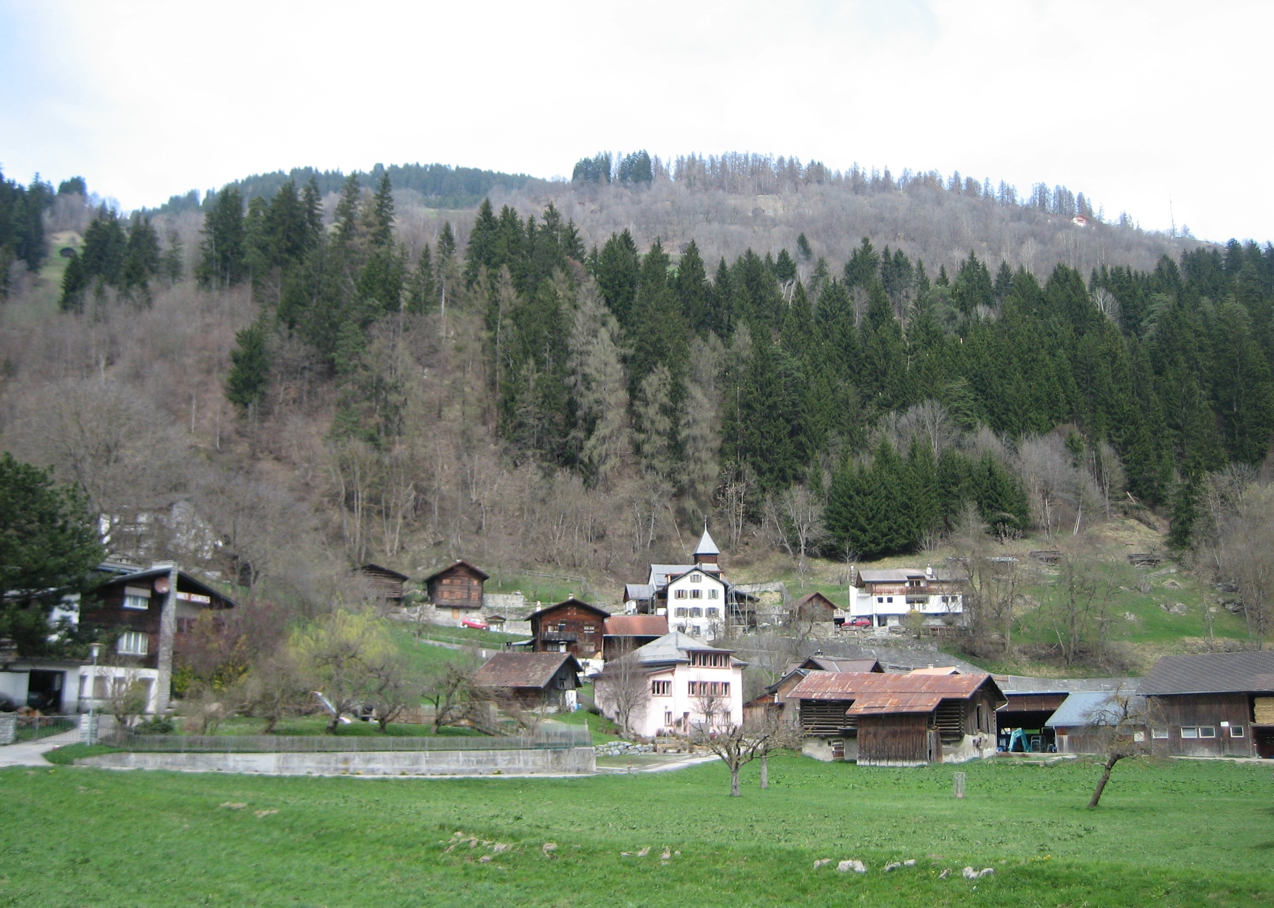 Schnaus